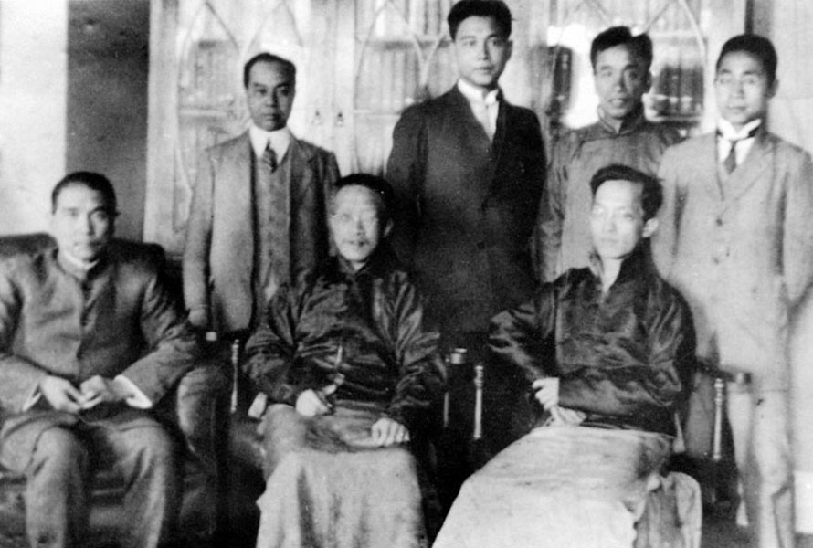 图为1919年，孙中山在上海莫利爱路29号（今香山路7号）与章太炎等合影。前排左起：孙中山、章太炎、胡汉民；后排右起：朱执信、古应芬、汪精卫。